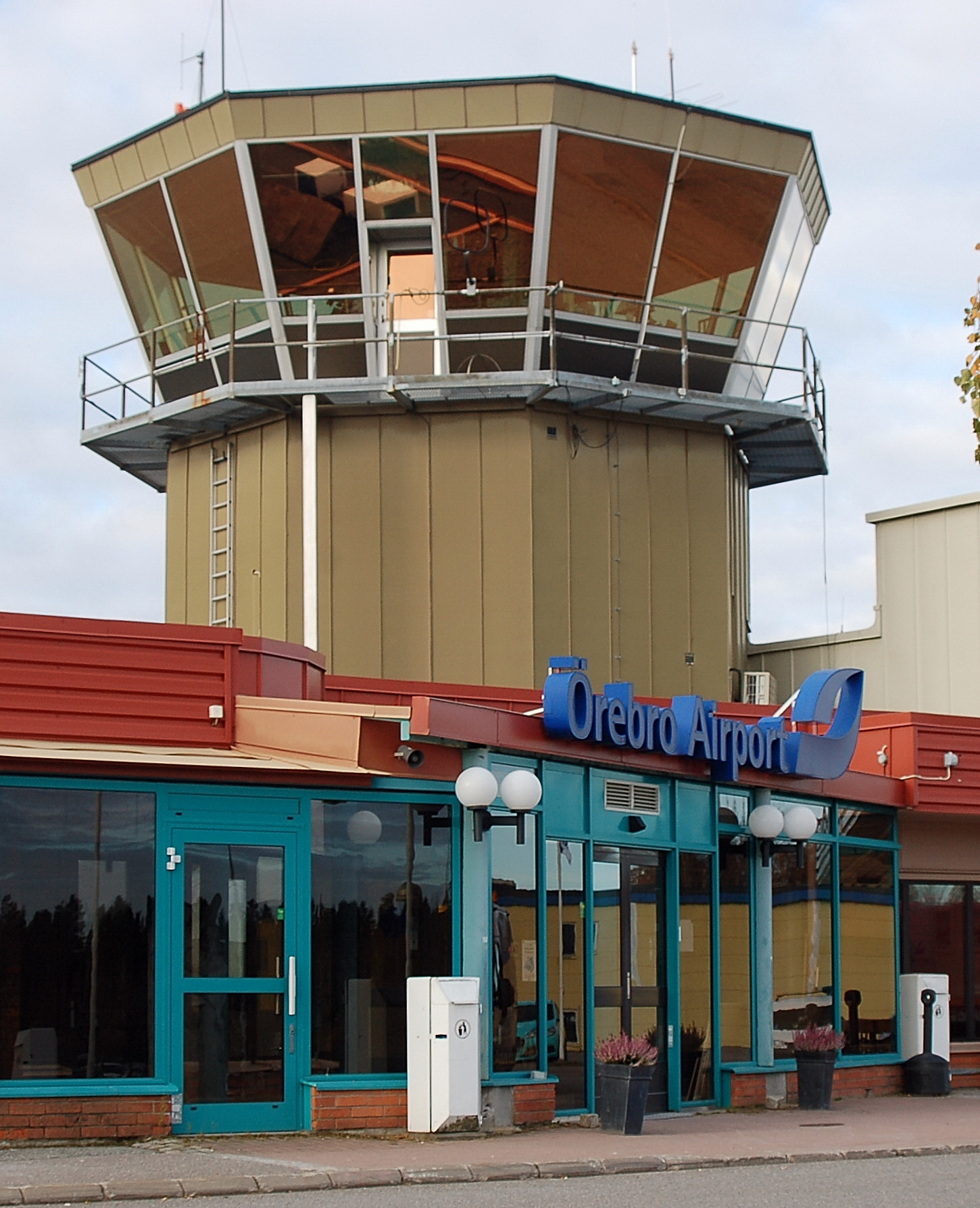 Trafikledartornet vid Örebro flygplats